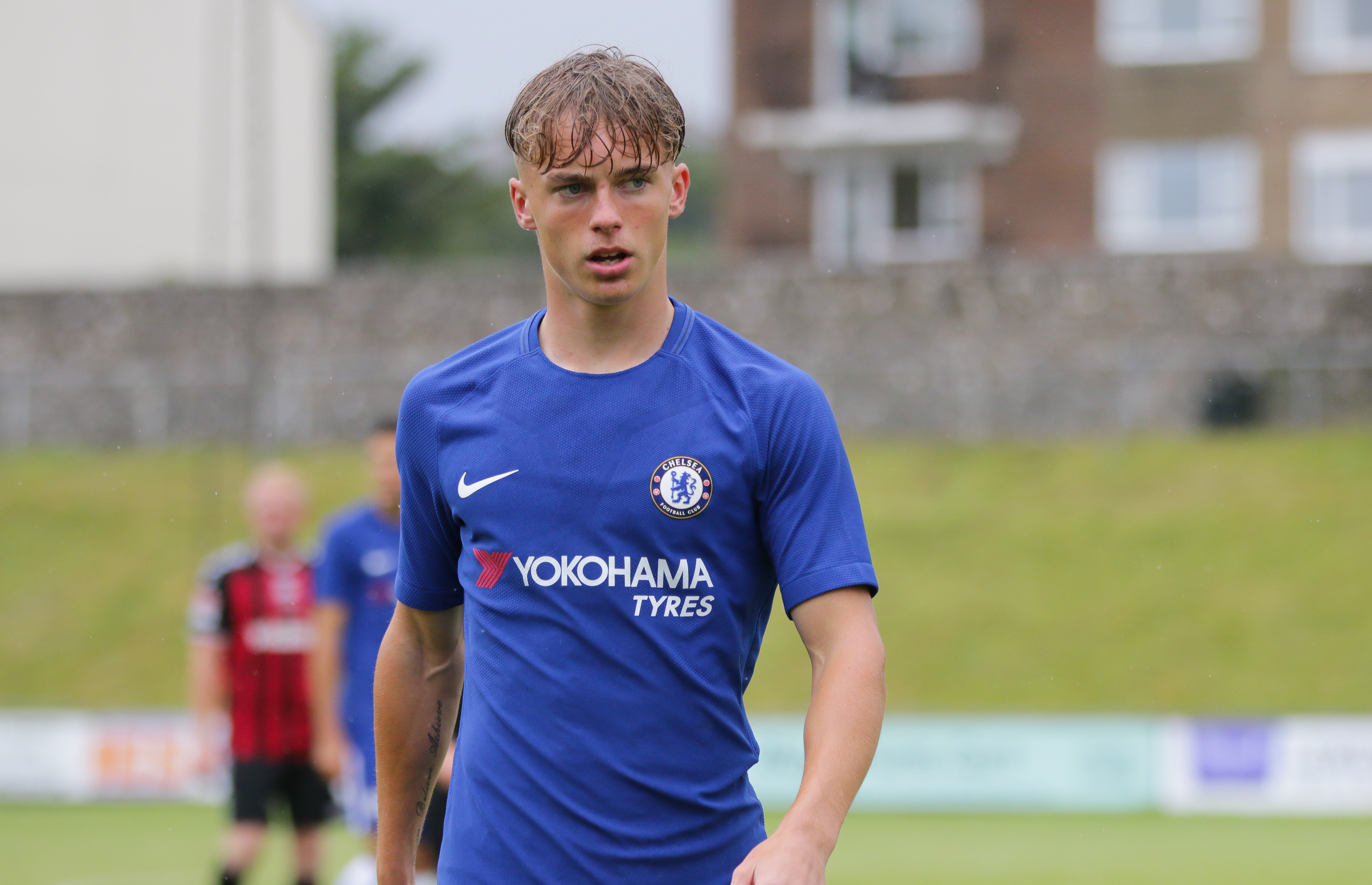 Luke McCormick